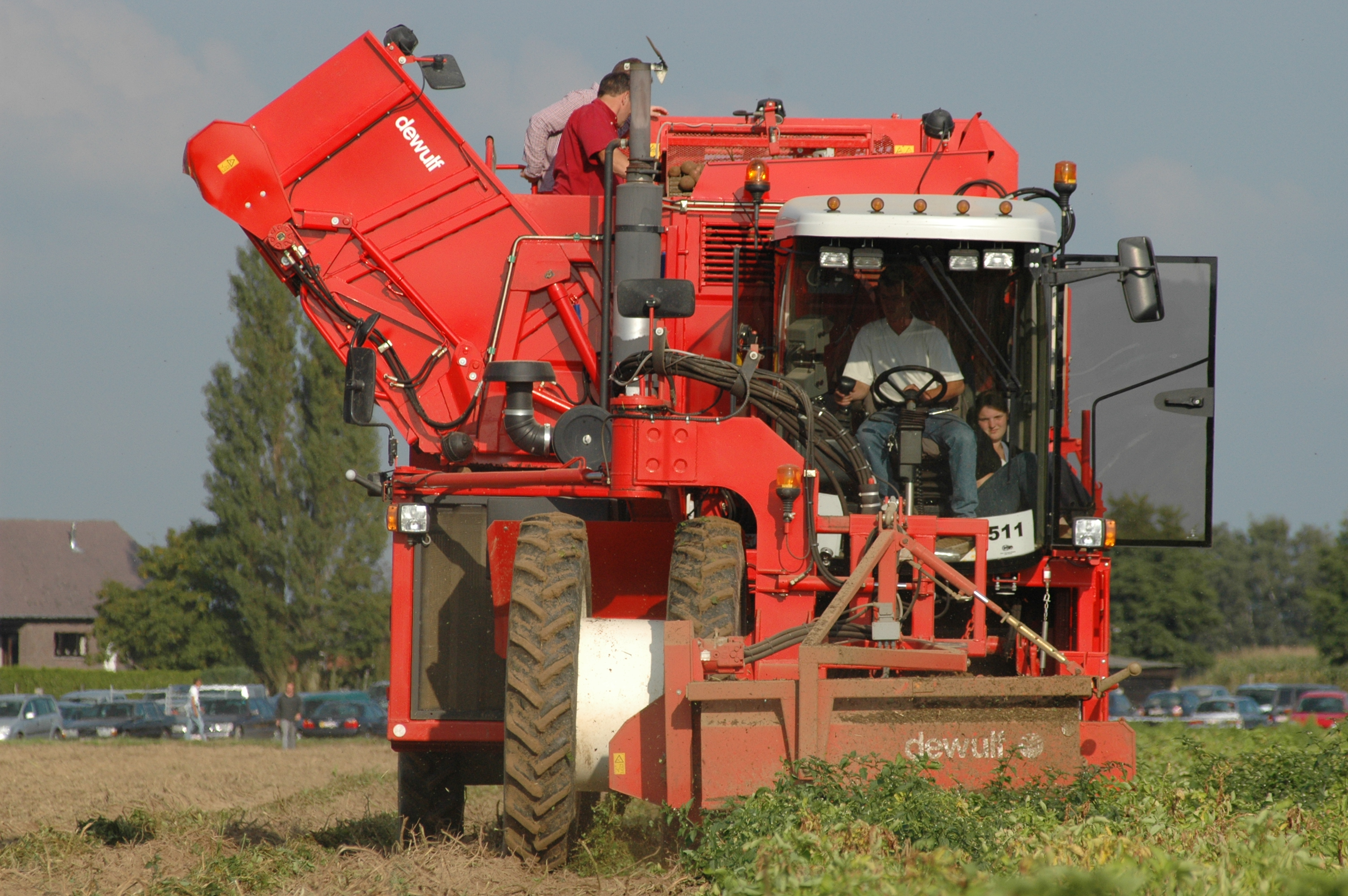 Dewulf R3000 Mega self-propelled potato harvester, Werktuigendagen 2005, Belgium